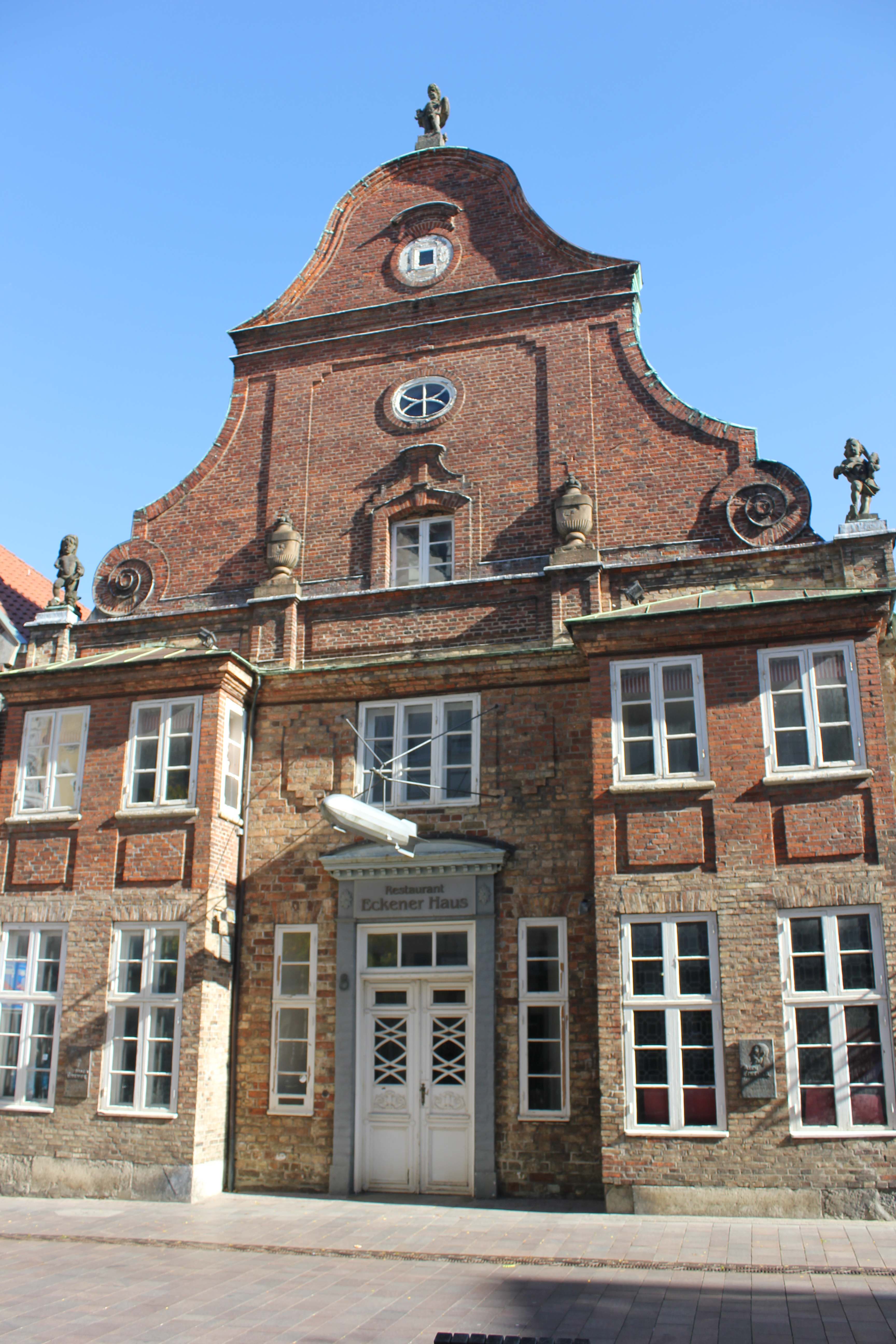 Eckener Haus (Vorderansicht), zweites Bild